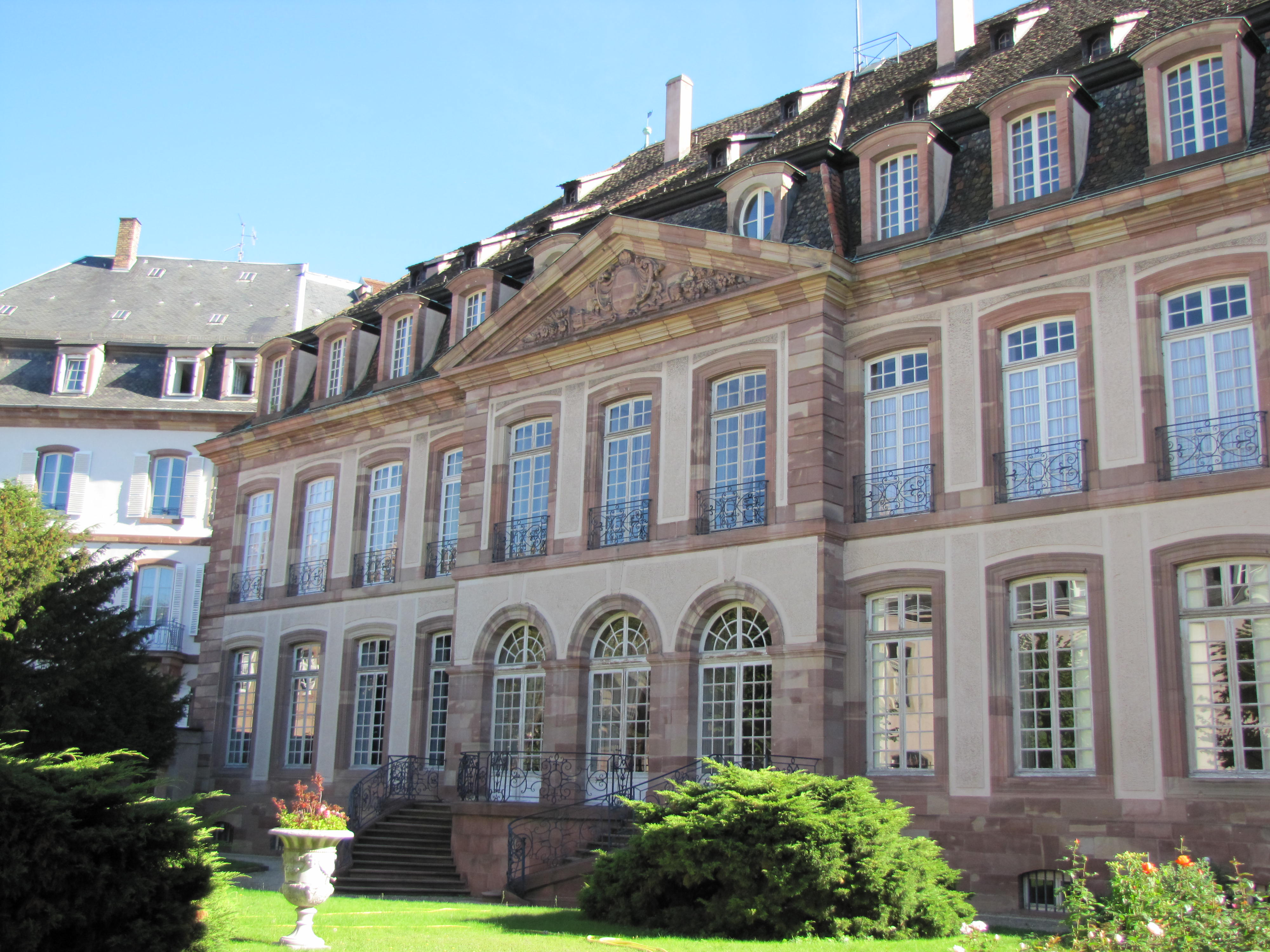 Alsace, Bas-Rhin, Strasbourg, Palais épiscopal de Strasbourg (XVIIIe), 3 rue du Parchemin, 16 rue Brûlée.